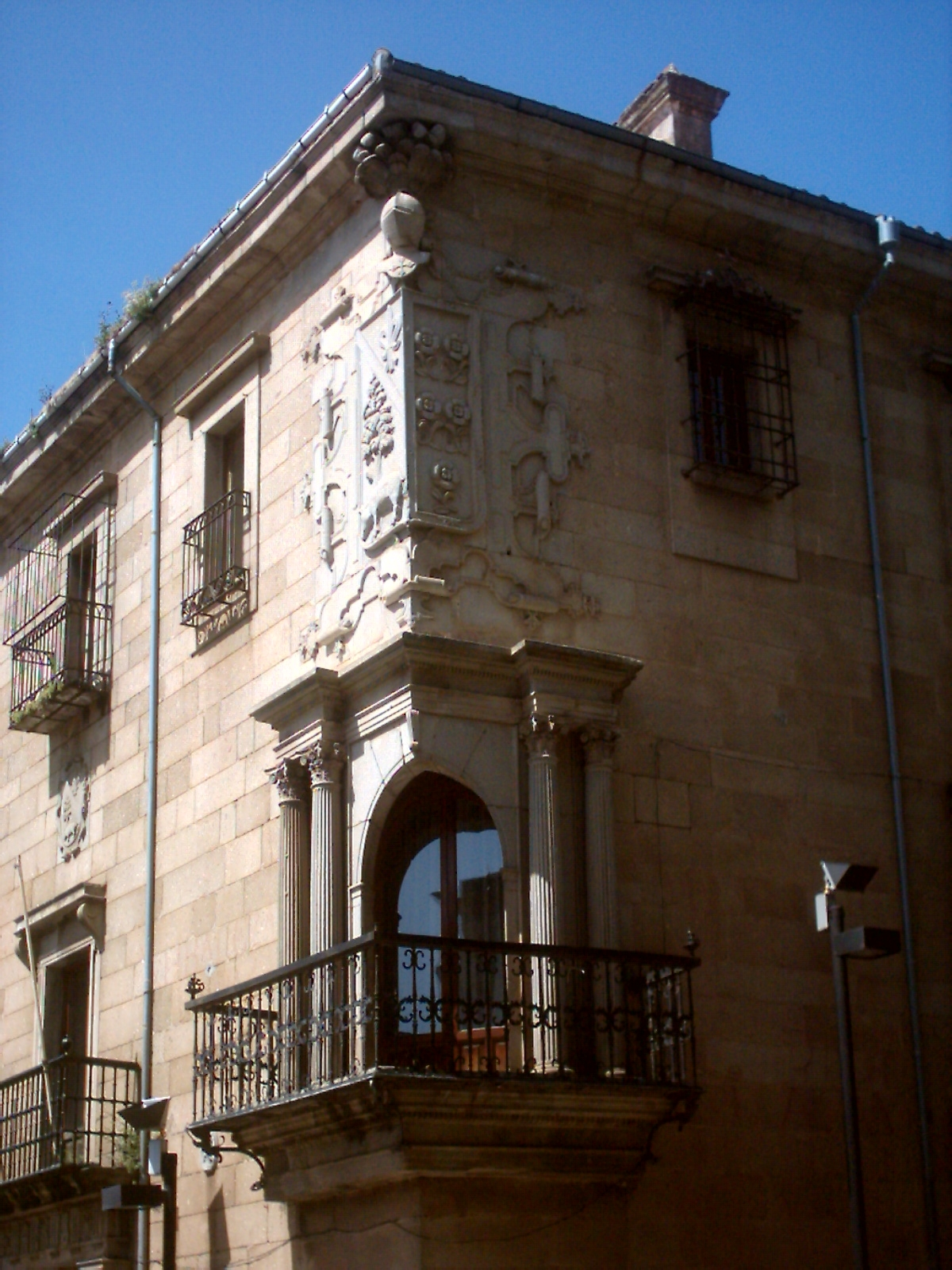 Balcon de la casa del Dean en Plasencia España